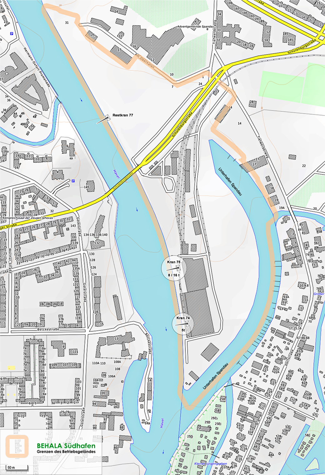 Betriebsgelände des Berliner Südhafens in Spandau im Besitz der BEHALA (Berliner Hafen- und Lagerhausgesellschaft)